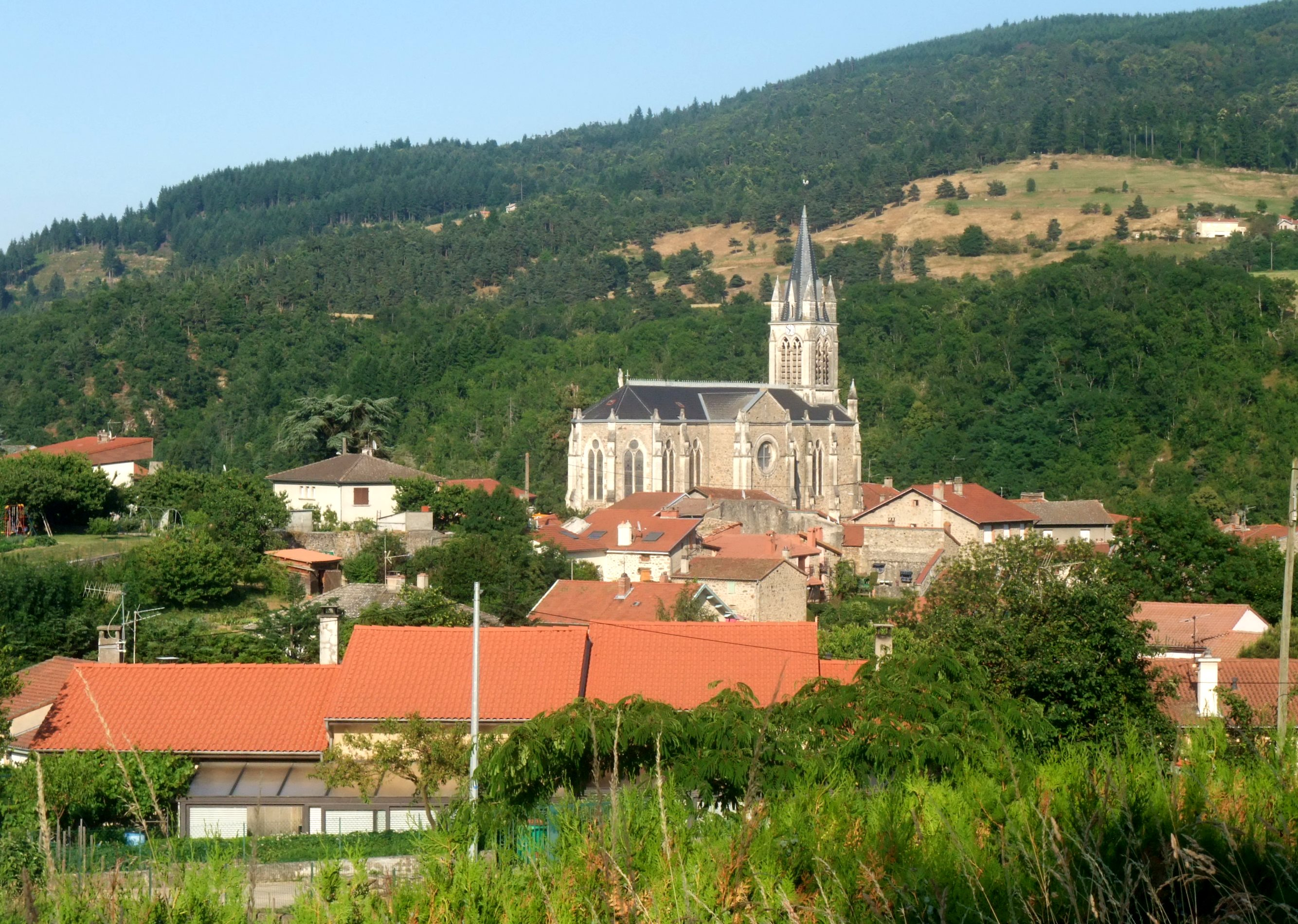 Villevocance église